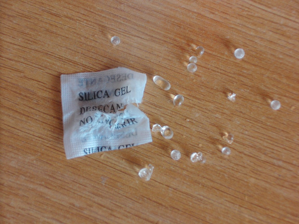 Una bolsa desecante con las bolitas de gel de sílice que llevaba dentro. Hay algo de agua por la mesa. Autor: Daniel Clemente Dominio público